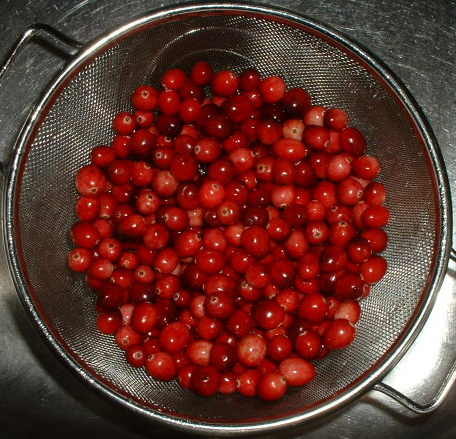 colander